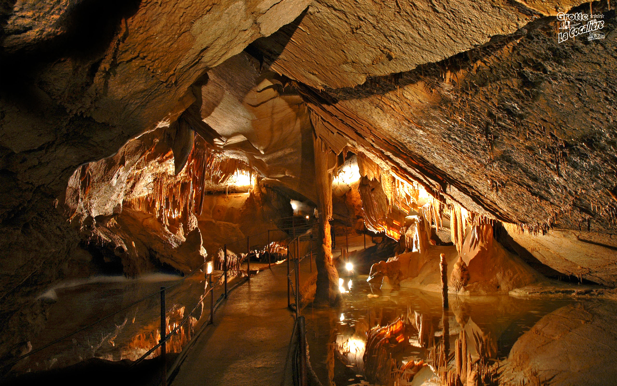 Salle des reflets